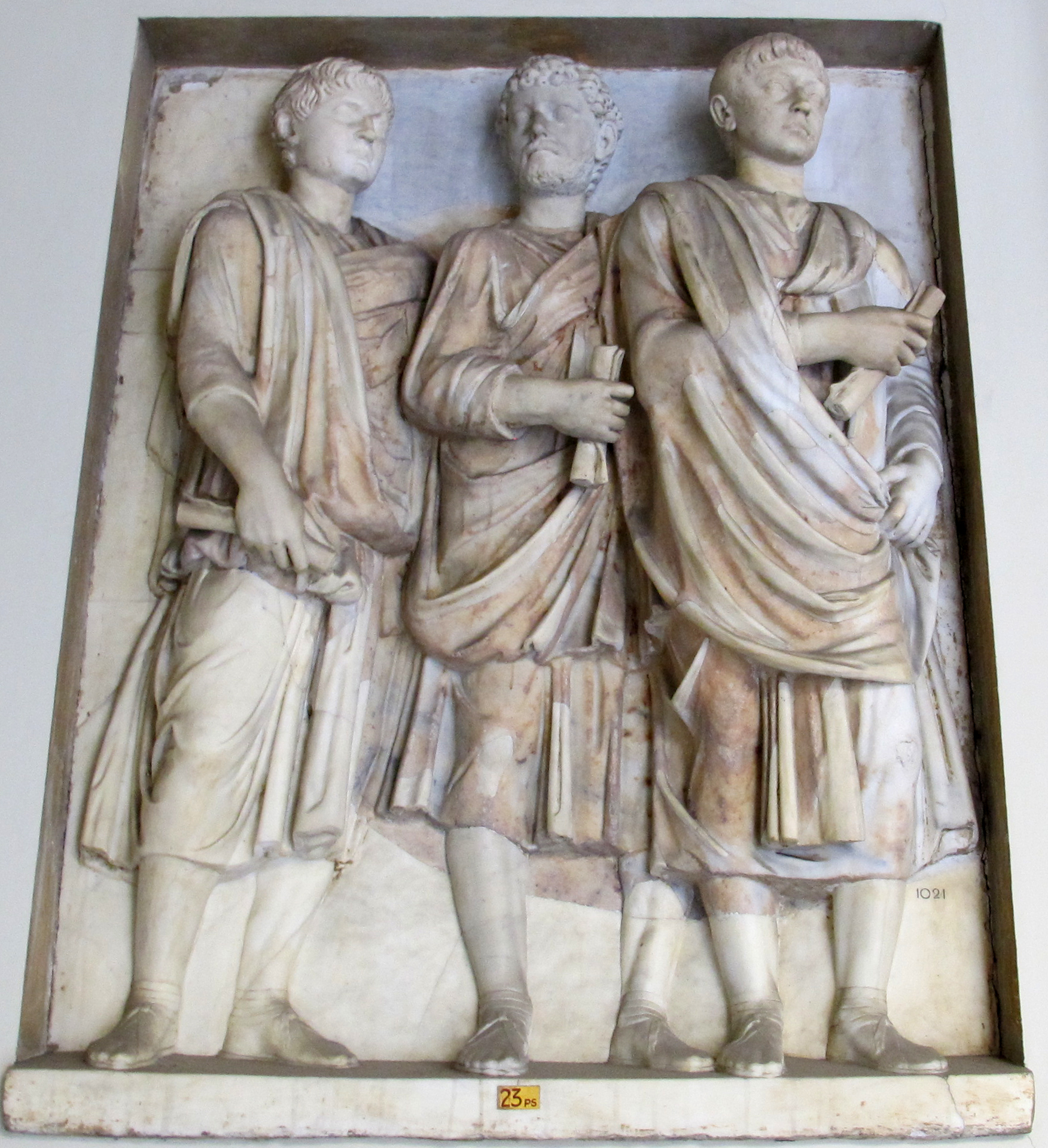 Arte romana nei Musei Vaticani